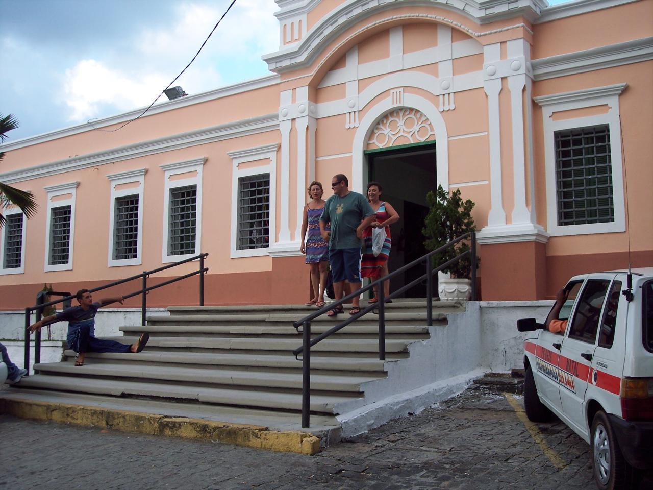 Centro de Turismo de Natal - Rio Grande do Norte - Brasil.